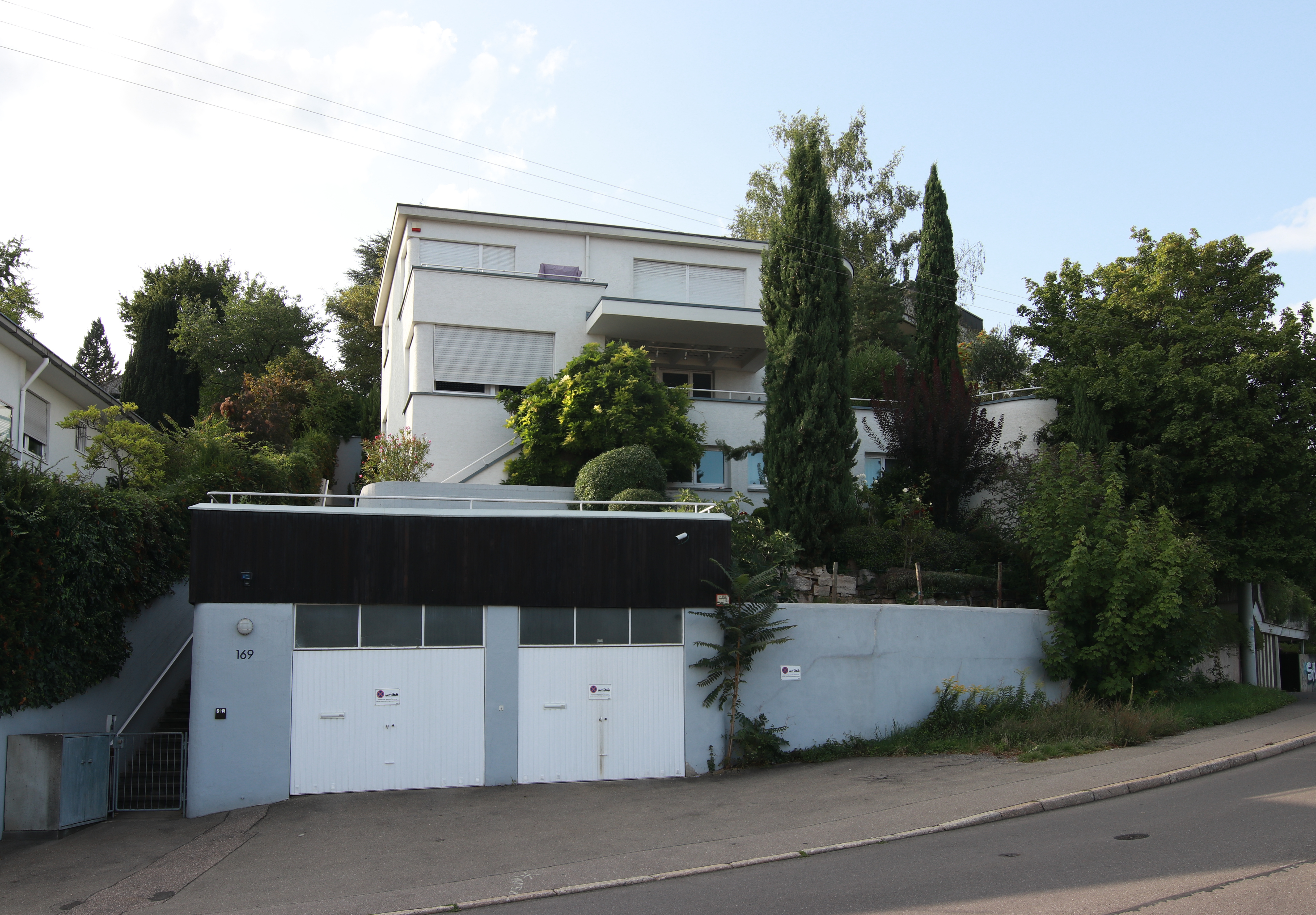 Villa Vetter, Birkenwaldstraße 169 in Stuttgart. Erbaut 1928-1930 von Richard Döcker im Stil von Bauhaus, Neues Bauen, Internationaler Stil. Geschützt nach § 2 DSchG